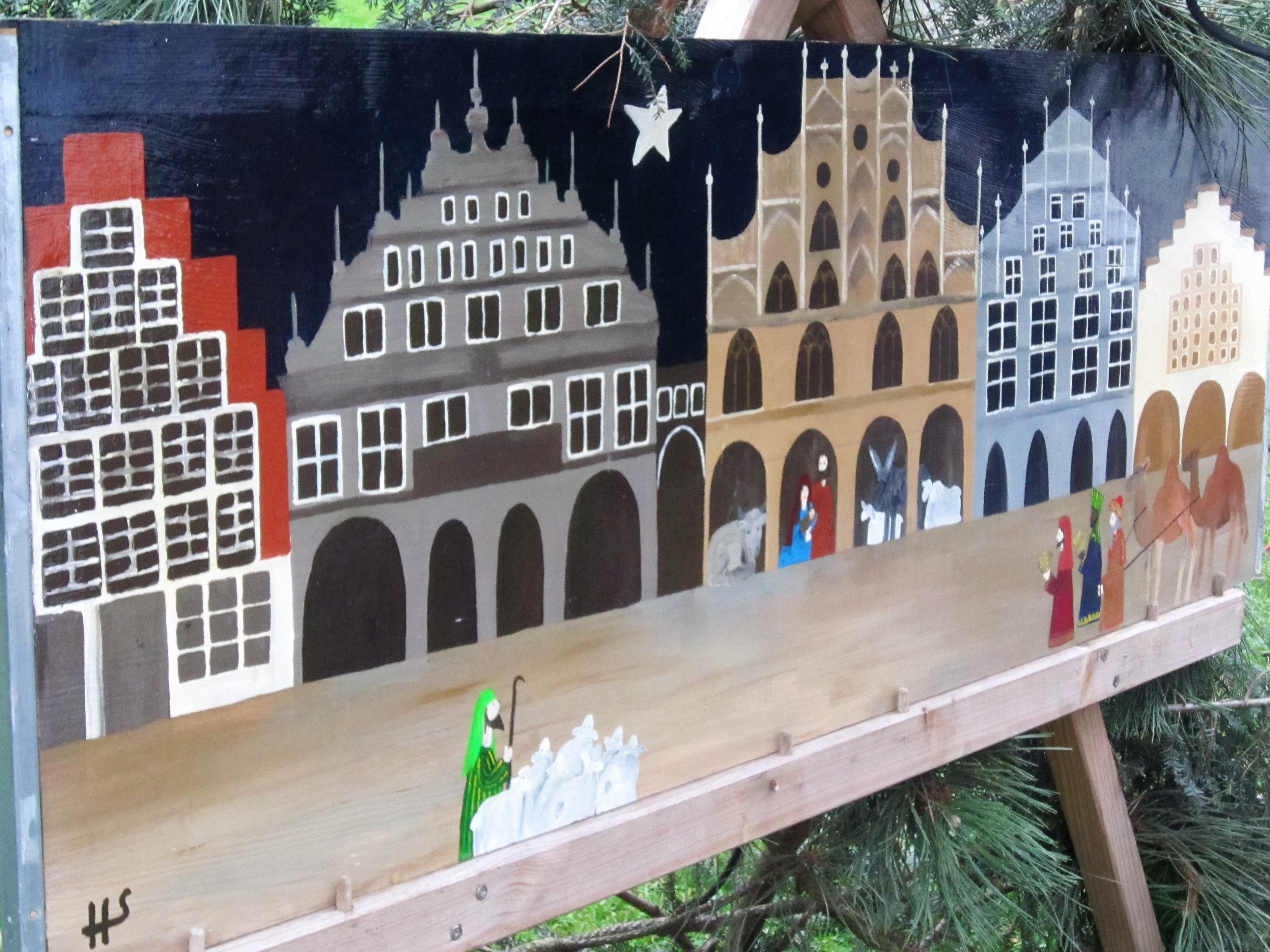 Auf den Prinzipalmarkt Münster verlegte gemalte Krippenszene, gezeigt auf dem Handorfer Krippenweg 2017